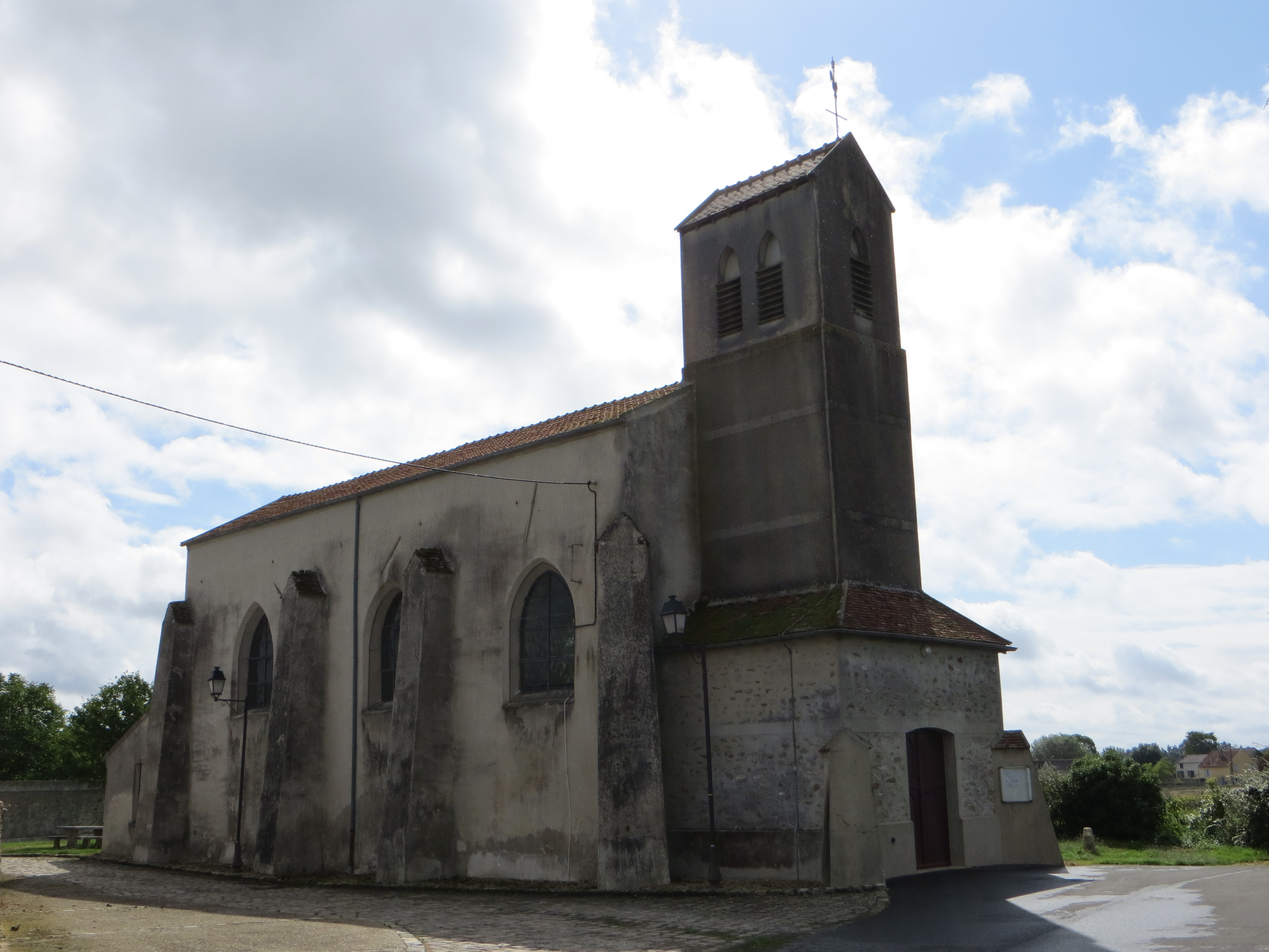 Vue de l'église